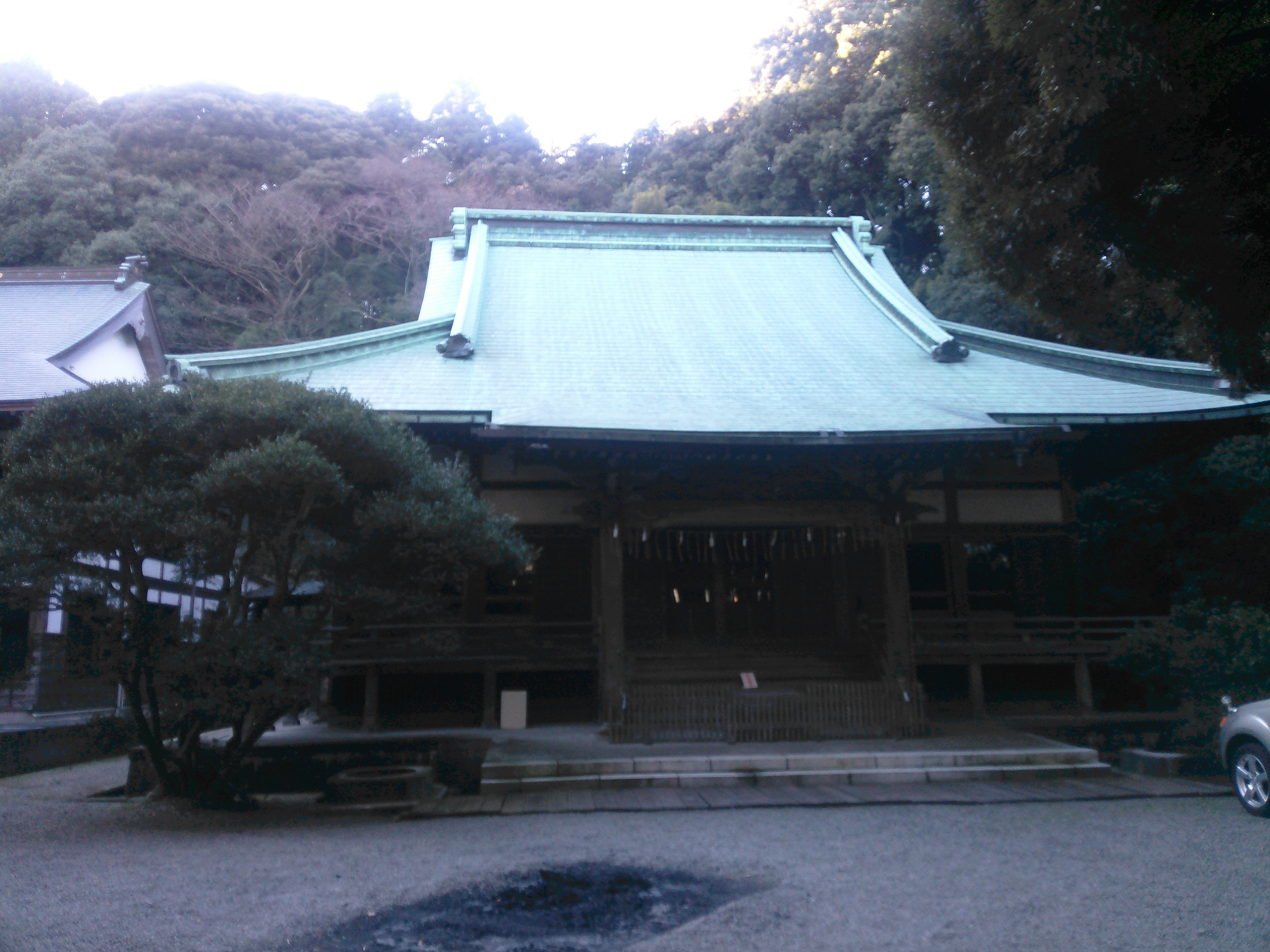 横浜市磯子区峰町、円海山護念寺の本堂